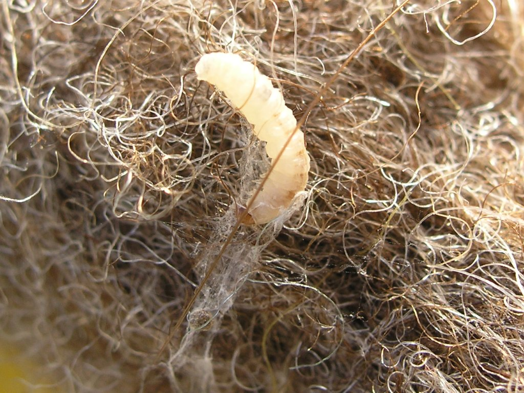 larva on felt, probably Tineola bisselliella